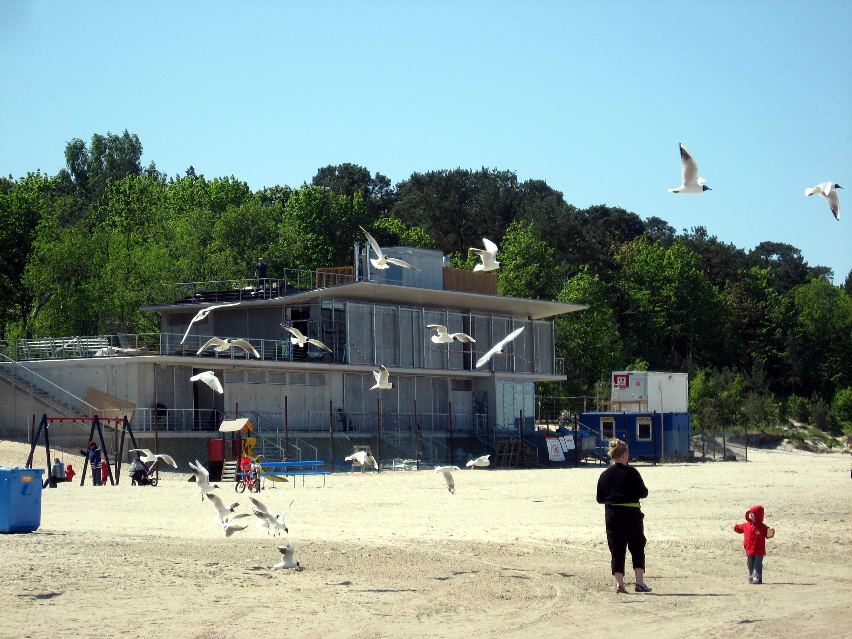 Jūrmala, rackové